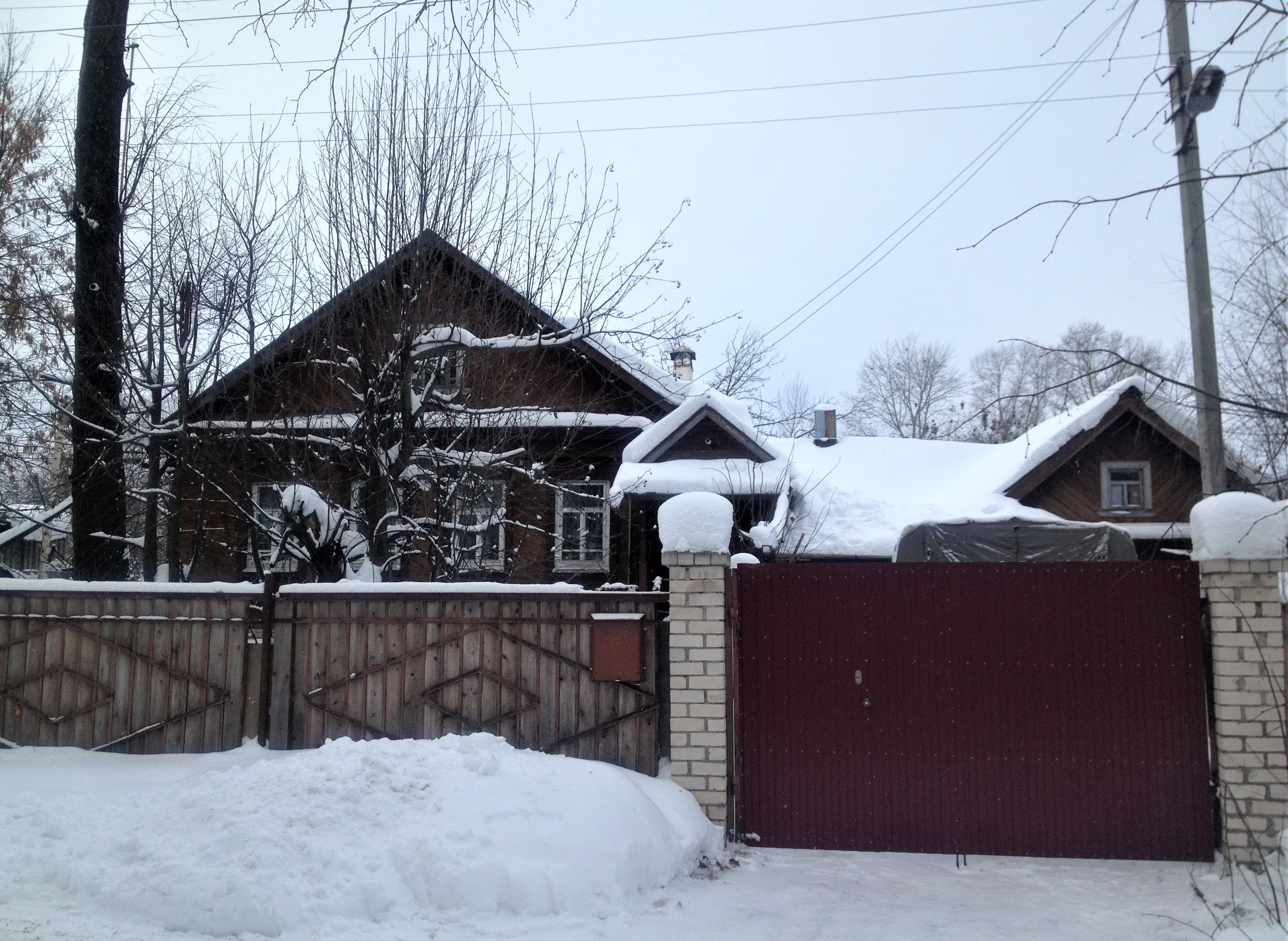 Дом на Карагандинской улице в городе Казани, в котором в 1934—1937 годах жил Борис Николаевич Ельцин.